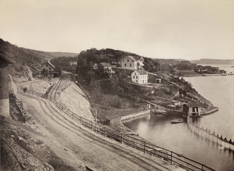 Bekkelagskollen med Bekkelaget stasjon på Smaalensbanen (senere Østfoldbanen). Ljabrochauséen til venstre (senere Mosseveien).